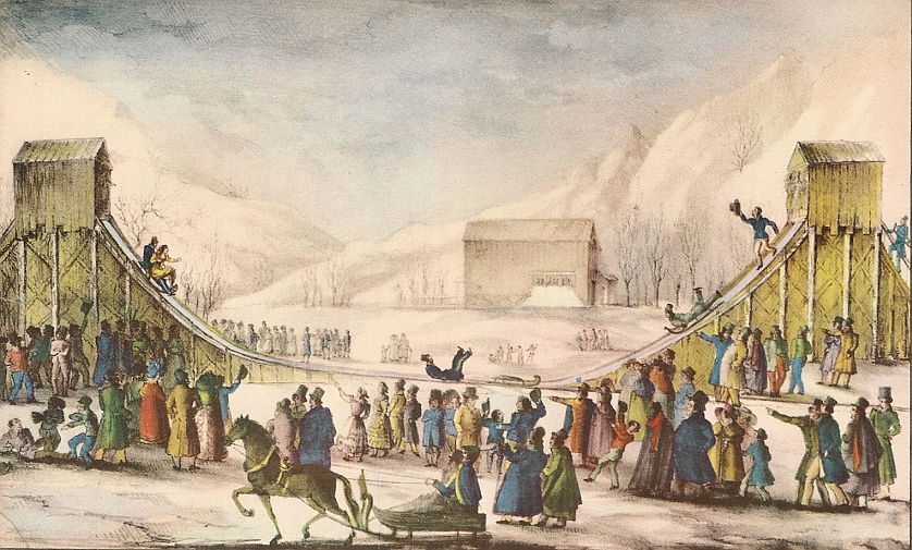 Montagnes russes en vinterdag på Kongl. Djurgården, Stockholm, 1830. Kolorerad litografi, Nationalmuseum, Stockholm